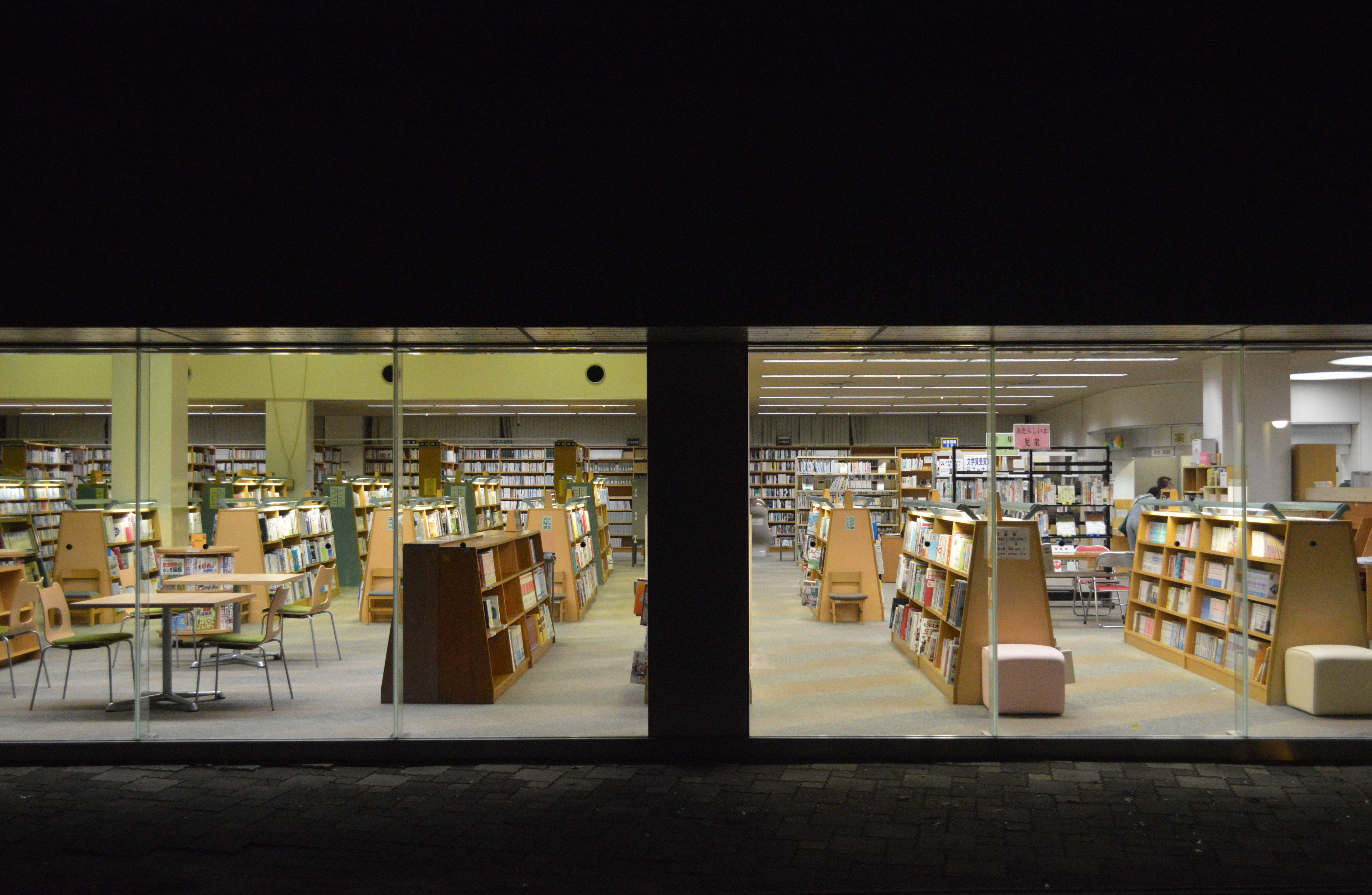 愛知県新城市の新城地域文化広場にある新城図書館。